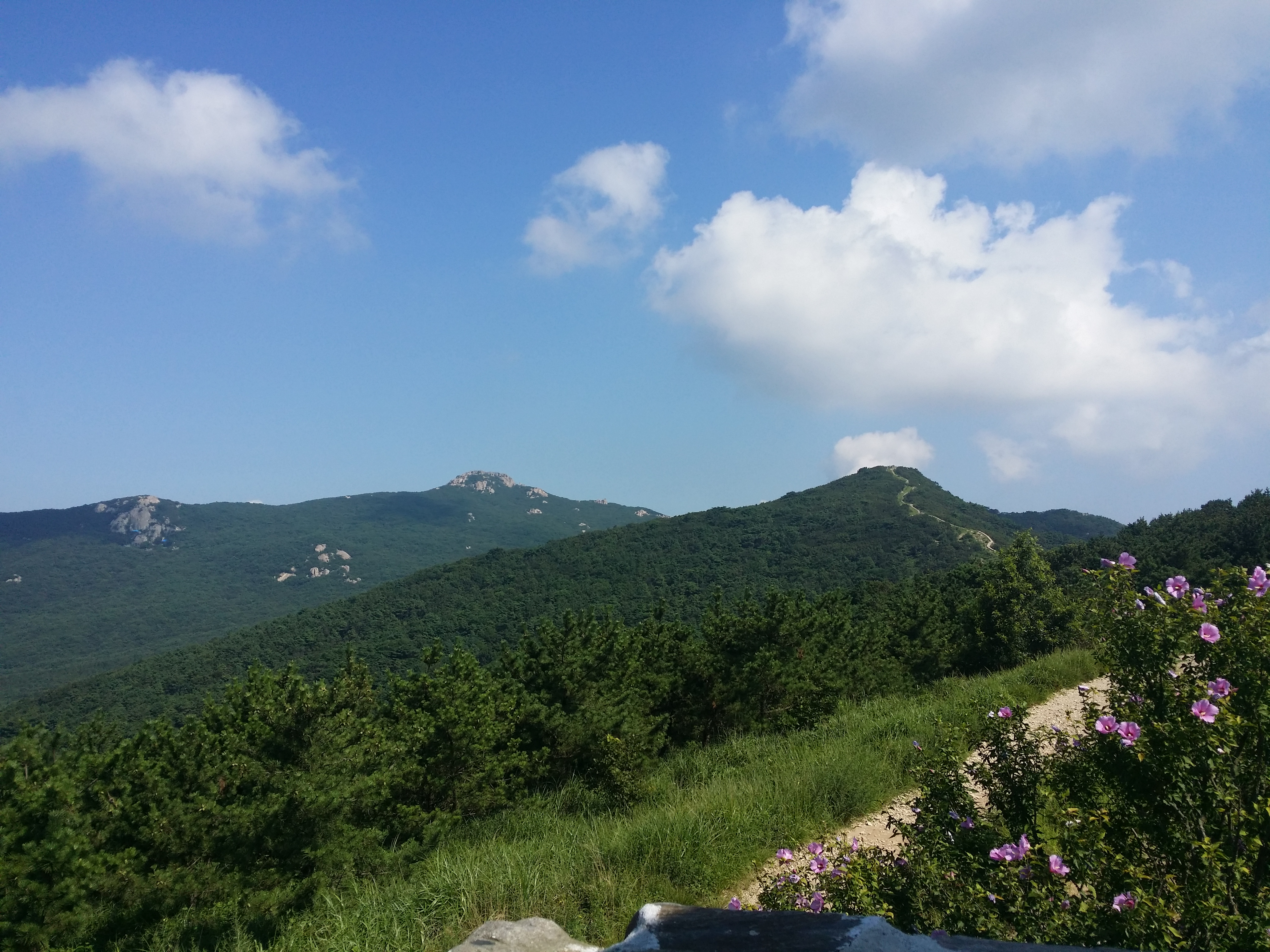 금정산 모습